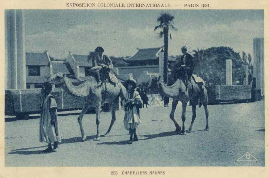 Les chameliers maures à l'Exposition Coloniale de Paris en 1931